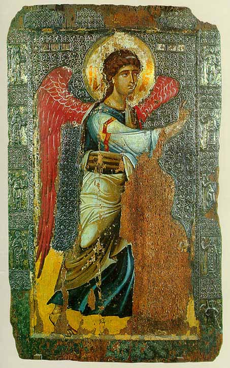 АРХАНГЕЛ ГАВРИЛ, Од црквата Богородица Перивлептос (Св. Климент) во Охрид. Денес во Галеријата на икони, Охрид.